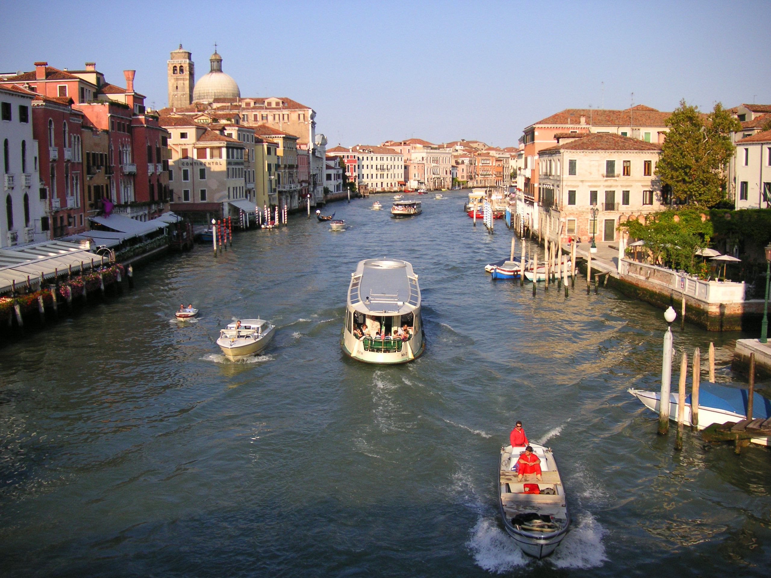 Canal Grande in Venedig, Italien